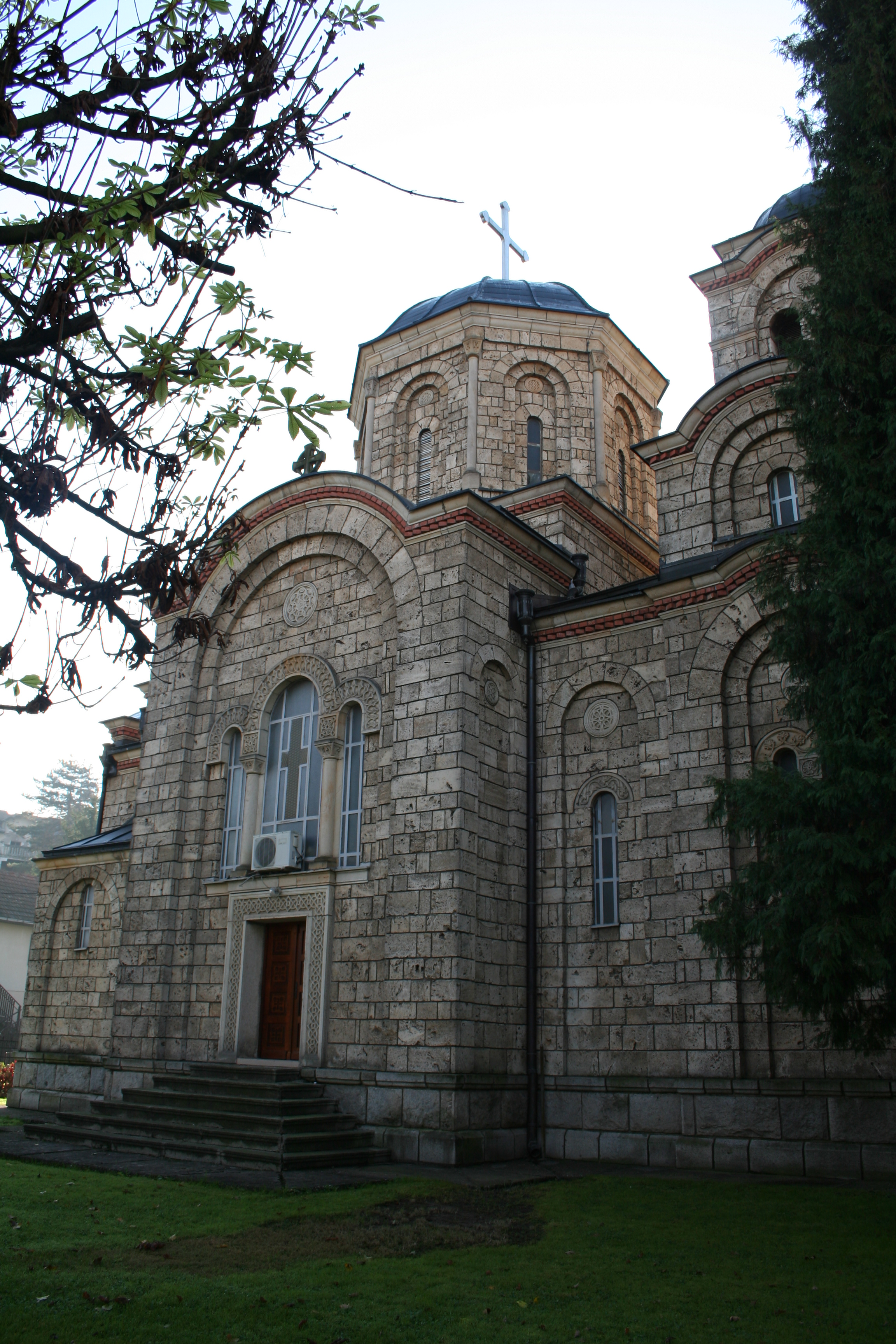 Crkva Sv. Petra i Pavla, Banja Koviljača